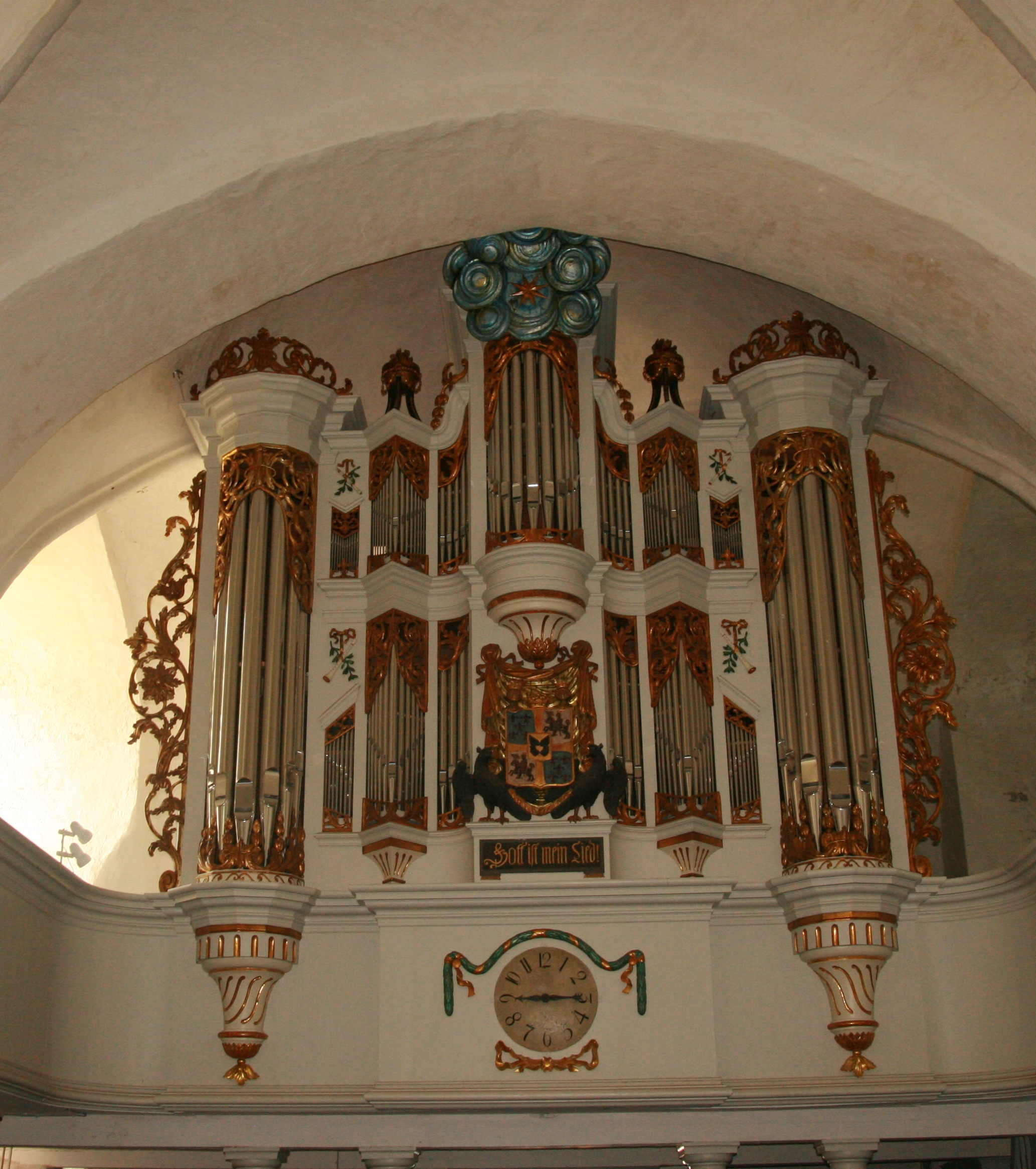 Sagard: St.Michael, Orgel von Christian Kindten aus dem Jahr 1796